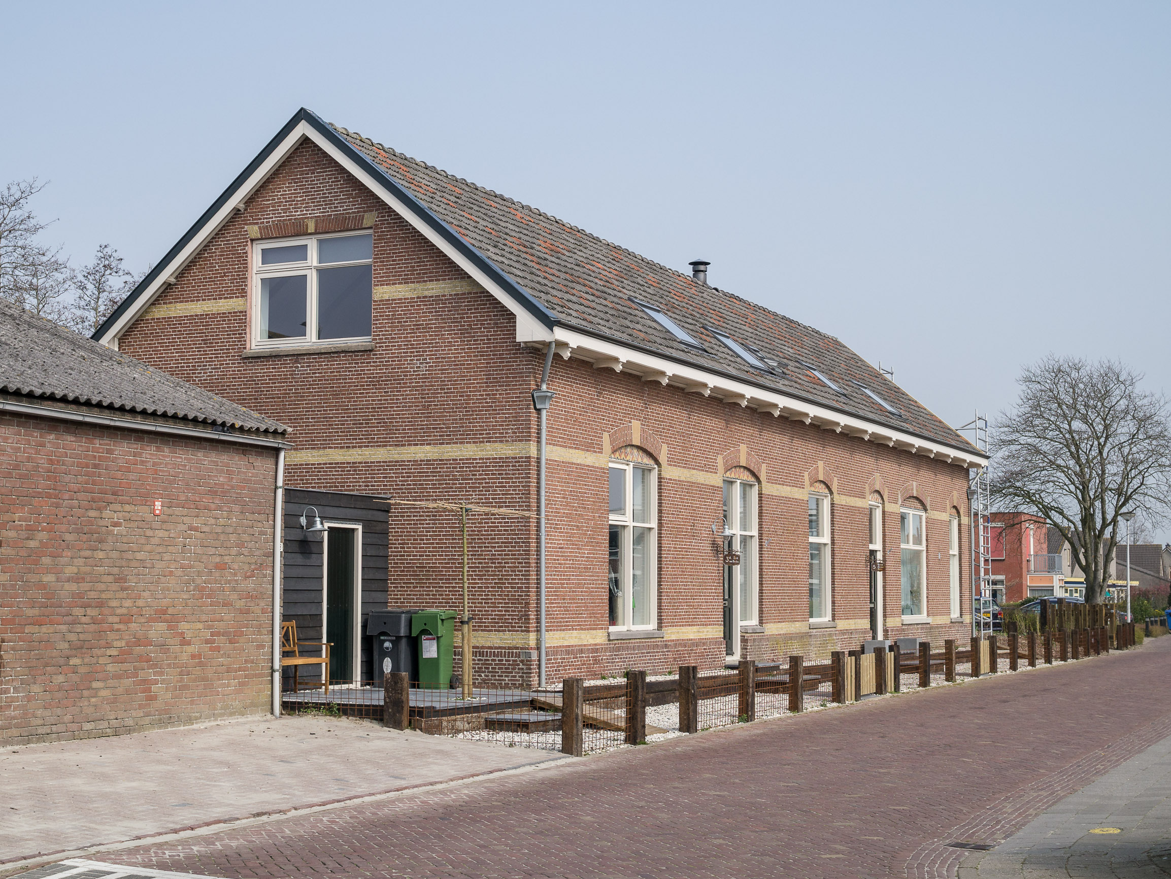 Voormalig Station Sint Annaparochie